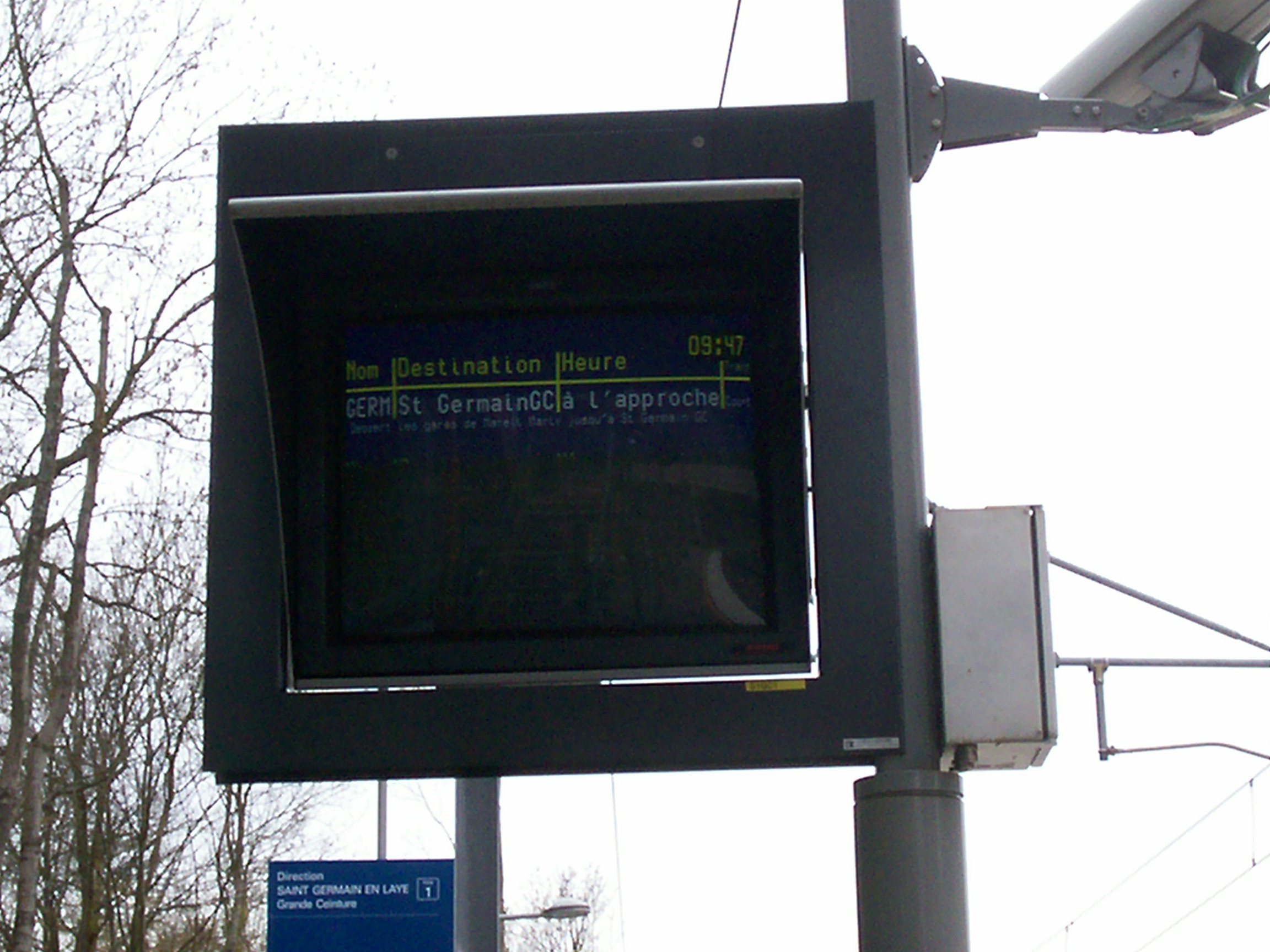 Gare de Saint-Nom-la-Bretèche GC